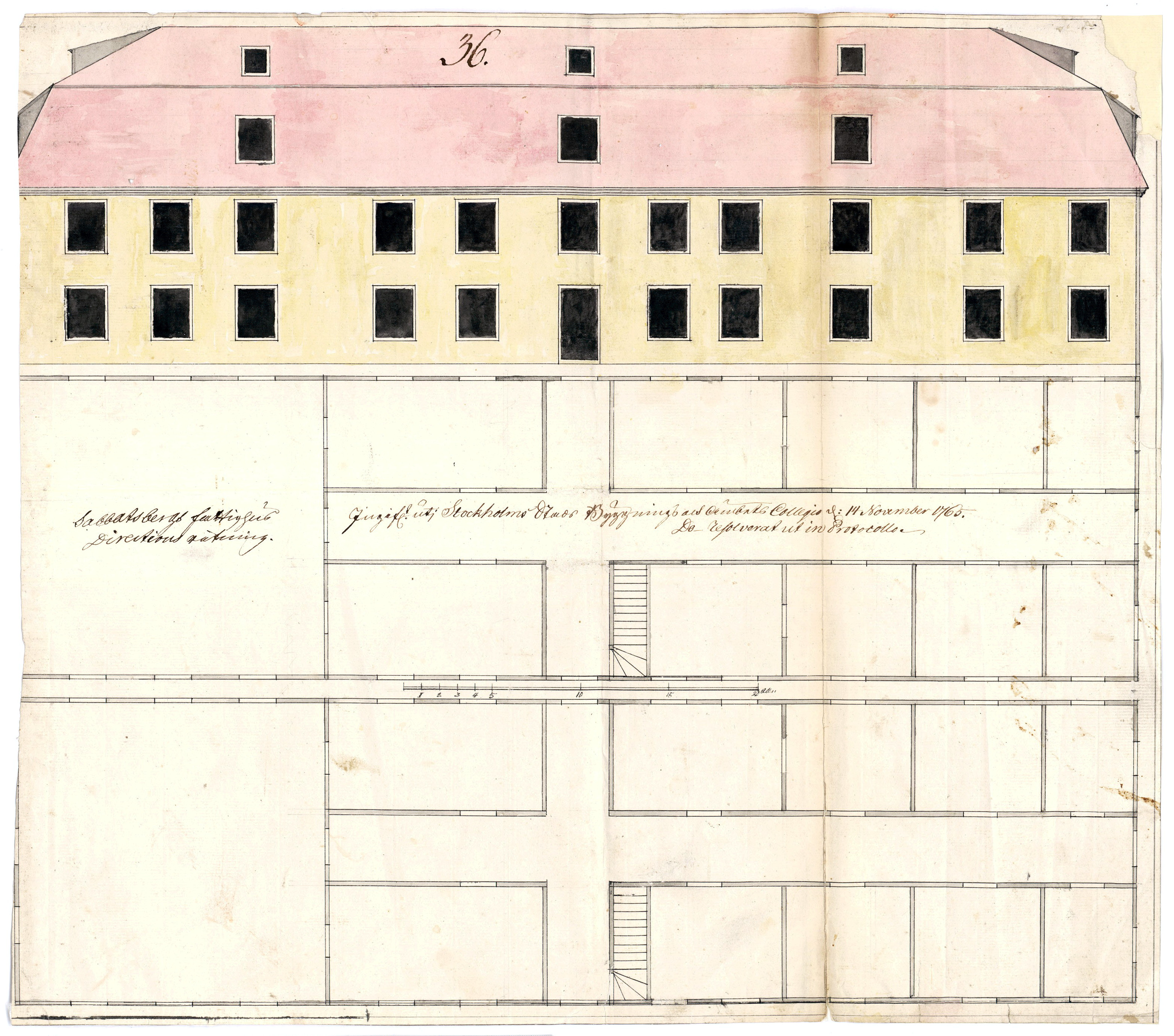 Originalritning för Katarinahuset, Sabbatsberg